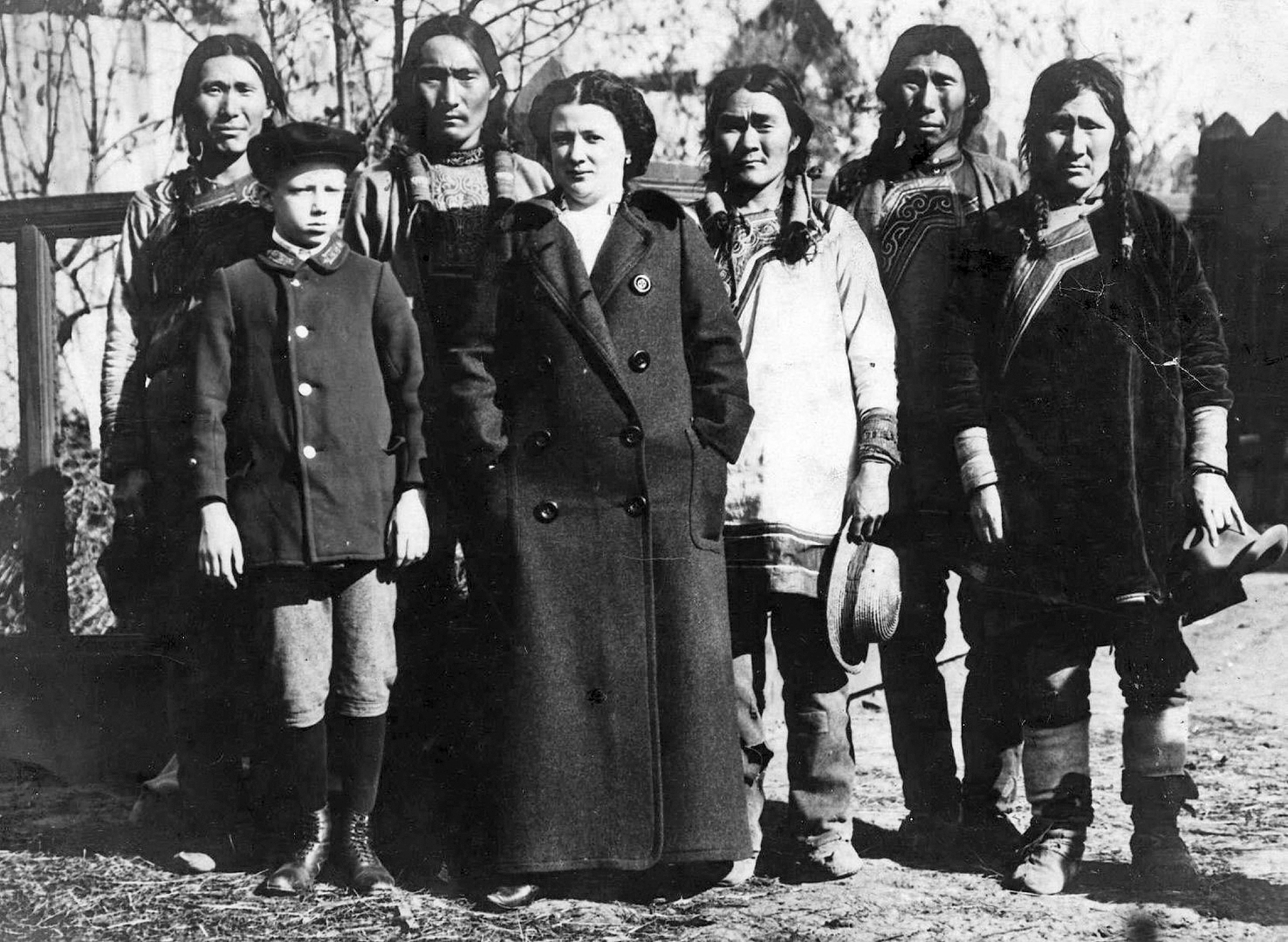 Анна Константиновна, жена В.К. Арсеньева, и его сын Владимир (Воля) среди проводников В.К. Арсеньева.